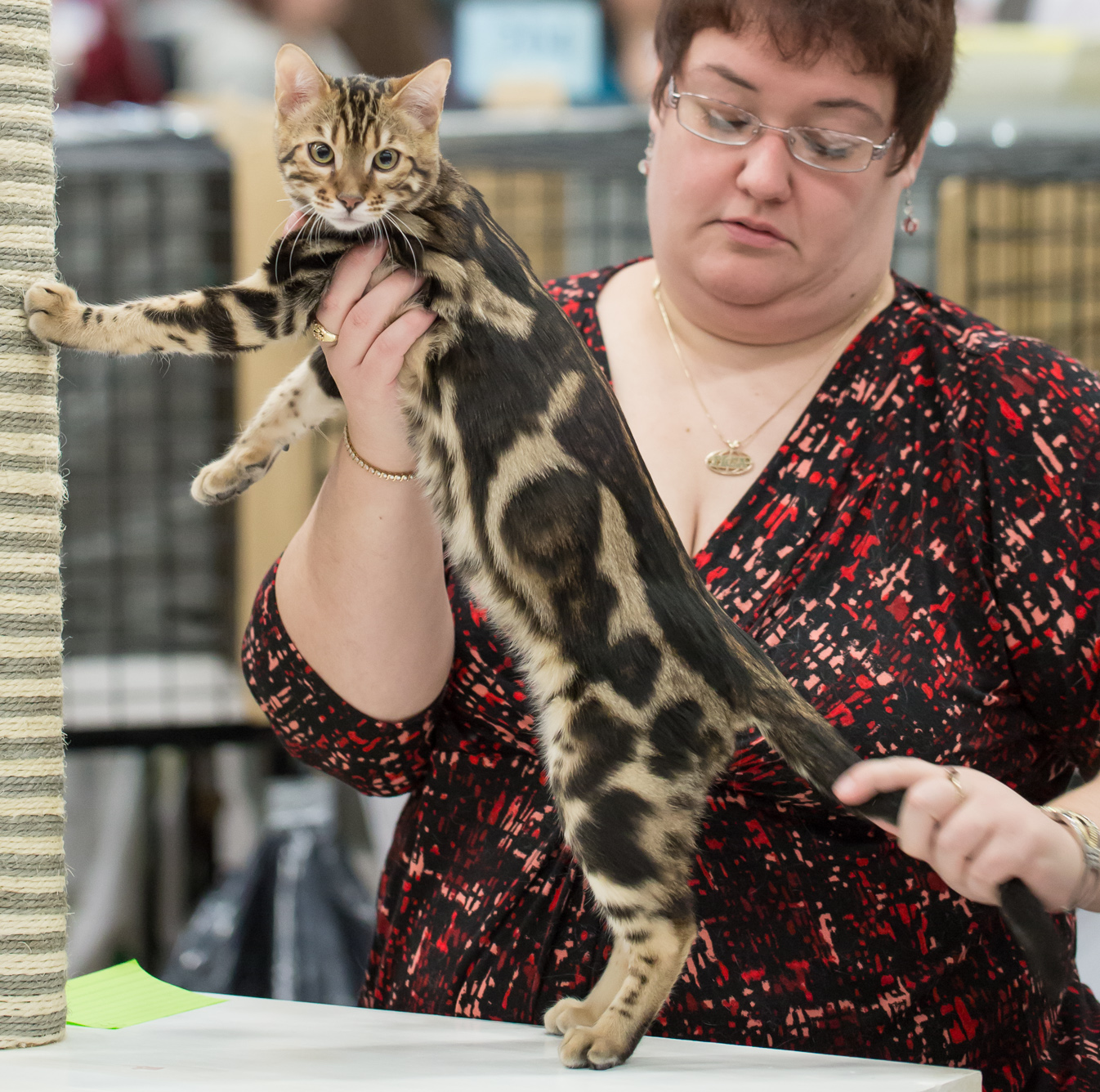 CattiCartano Hemlock, bengal de quatre mois à l'exposition féline d'Helsinki en 2013. Code FIFé : CattiCartano Hemlock (Hemppa) [BEN n 22] at the age of 4 months